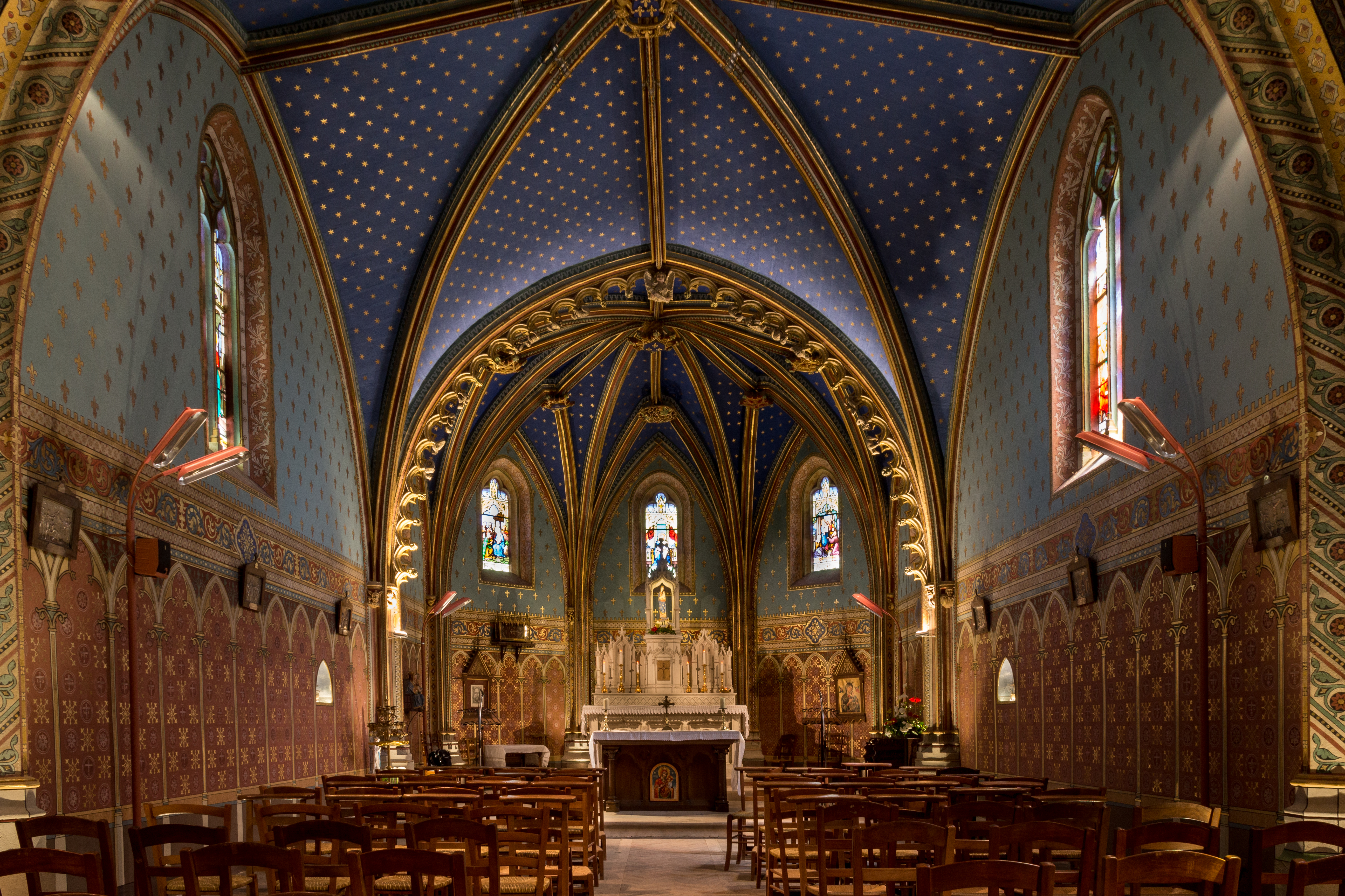 Chapelle de Condat Libourne Gironde